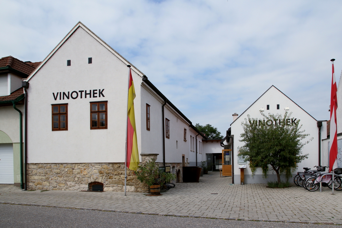 Das Weinkulturzentrum in der burgenländischen Gemeinde Gols.